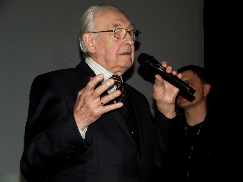 Zdjęcie zrobione podczas premiery zrekonstruowanej cyfrowo "Ziemi Obiecanej", podczas festiwalu filmowego OFF Plus Camera.